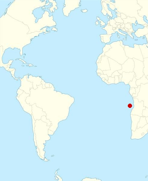 Distribución de Titaniloricus inexpectatovus Gad, 2005